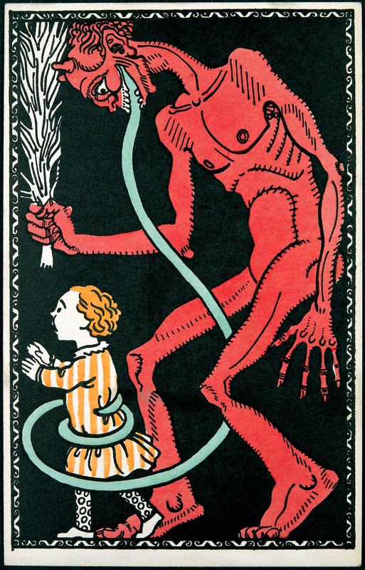 Diese im Format 14 cm x 9 cm mehrfarbig lithographierte Postkarte mit der Nummer 542 eines anonymen Künstlers der Wiener Werkstätte entstand um 1911 und wird als sogenannte Wunschkarte (Glückwunschkarte) bezeichnet, speziell auch als „Krampus mit Kind“ Die unbenutzte Karte, auch als "mint" oder "ungelaufen" bezeichnet (also postalisch nicht verwendet), wurde in der vom Auktionshaus Markus Weissenböck am 12. Oktober 2003 durchgeführten Auktion mit einem Zuschlag von 11.000,-- Euro versteigert ...